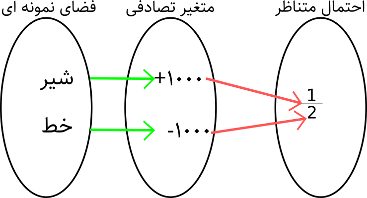 این تصویر رابطه‌ی فضای نمونه‌ای و متغیر تصادفی و تابع احتمال را نشان می‌دهد.